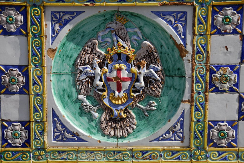 Caltagirone, ITA